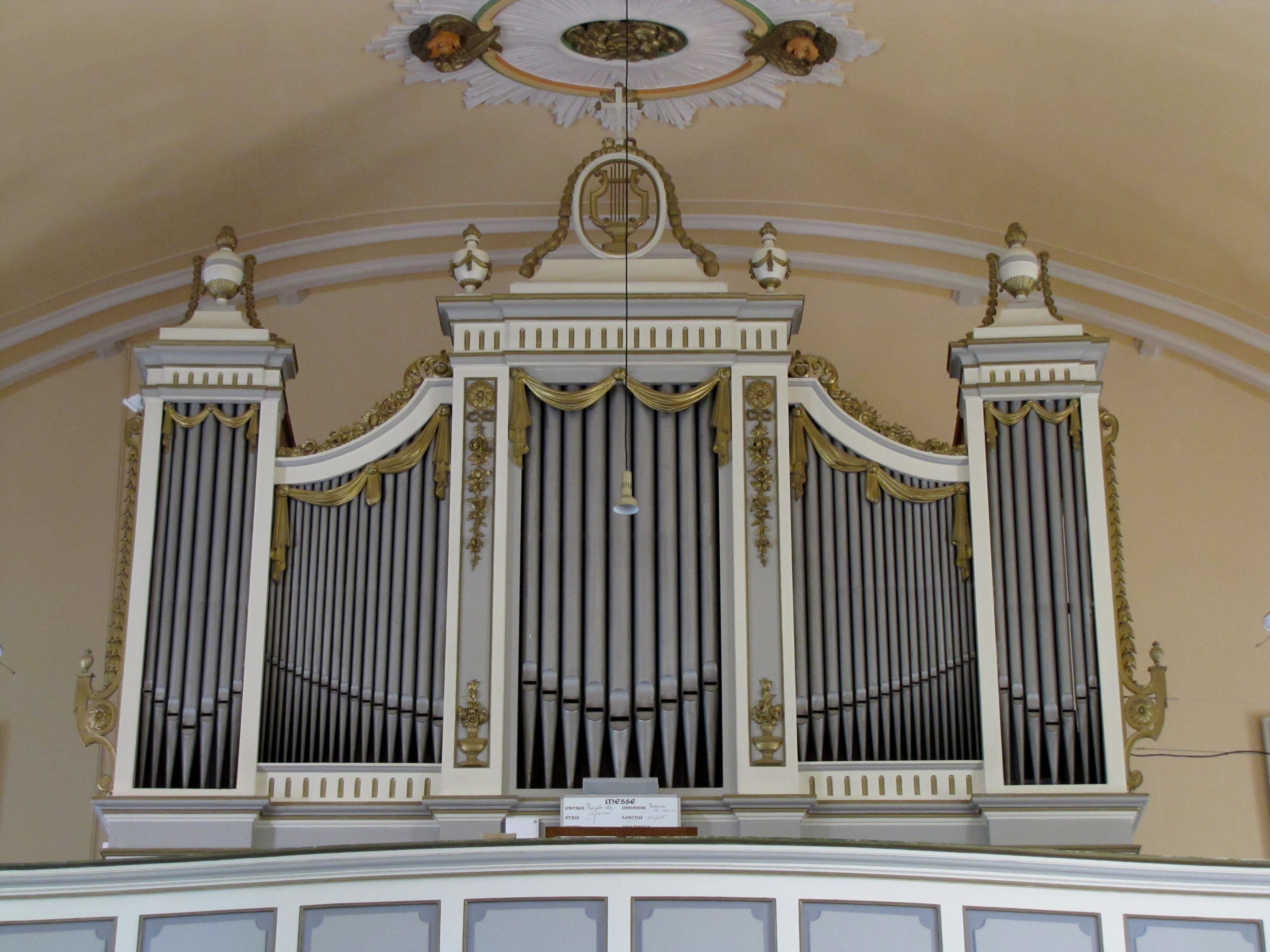 Alsace, Bas-Rhin, Église Saint-Barthélemy de Durrenbach (IA67007777). Orgue de tribune néo-baroque Roethinger (1917)